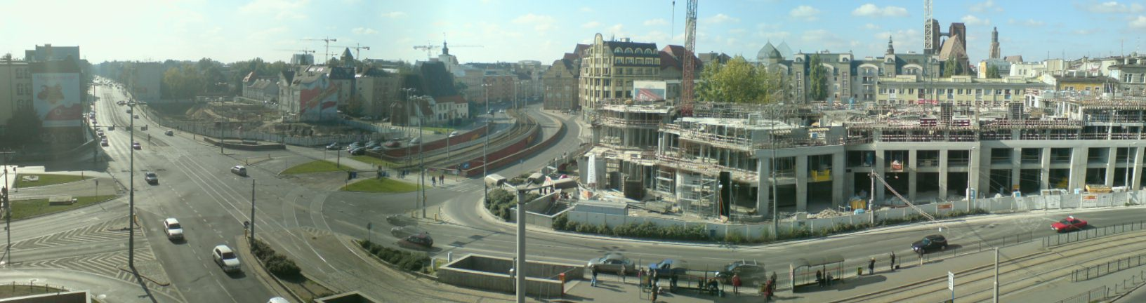 Pl. Dominikański i ul. Piaskowa - nucek